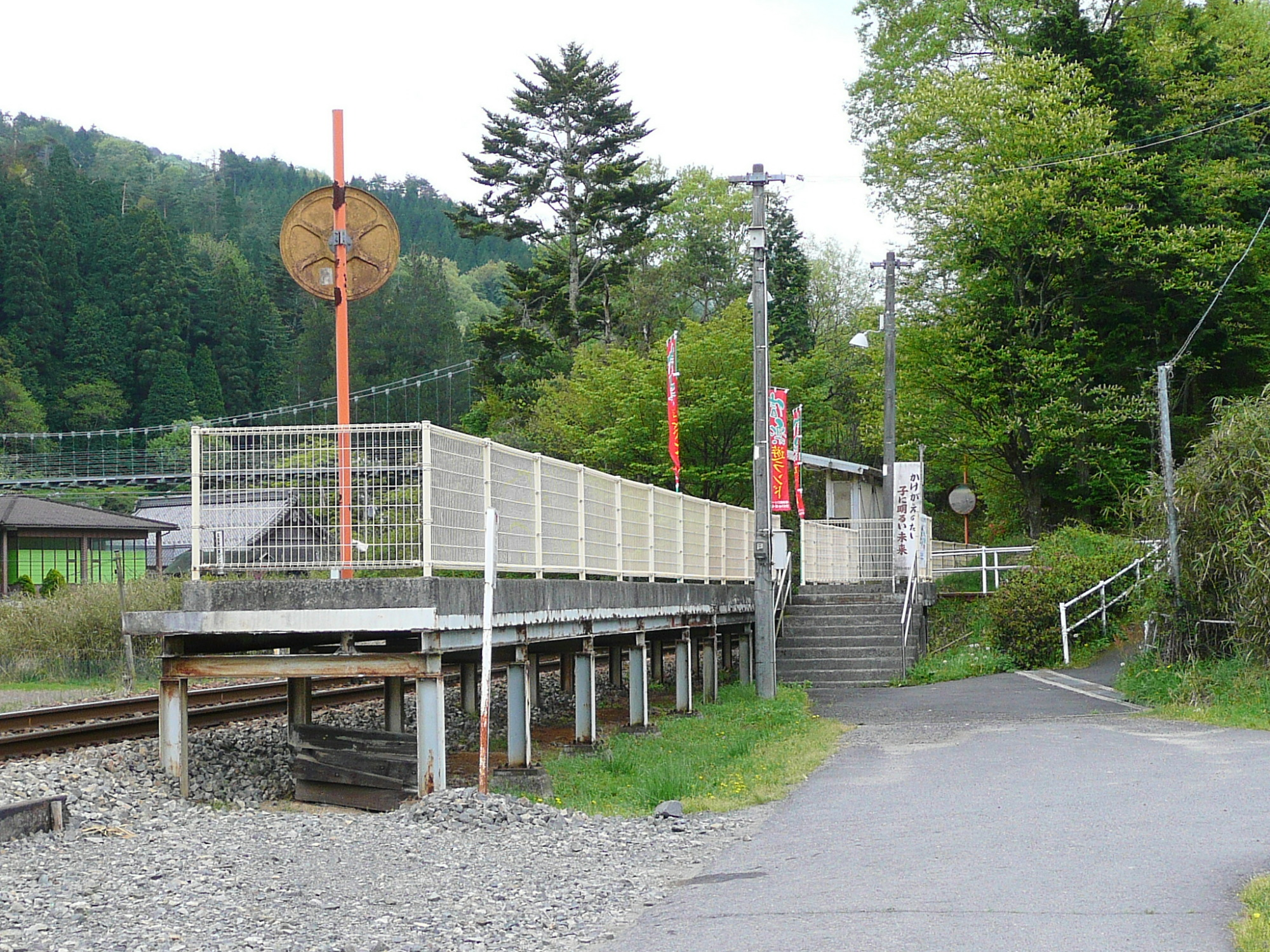 Shigaraki Kogen Railway,Gyokukeijimae Station. / 信楽高原鐵道・玉桂寺前駅